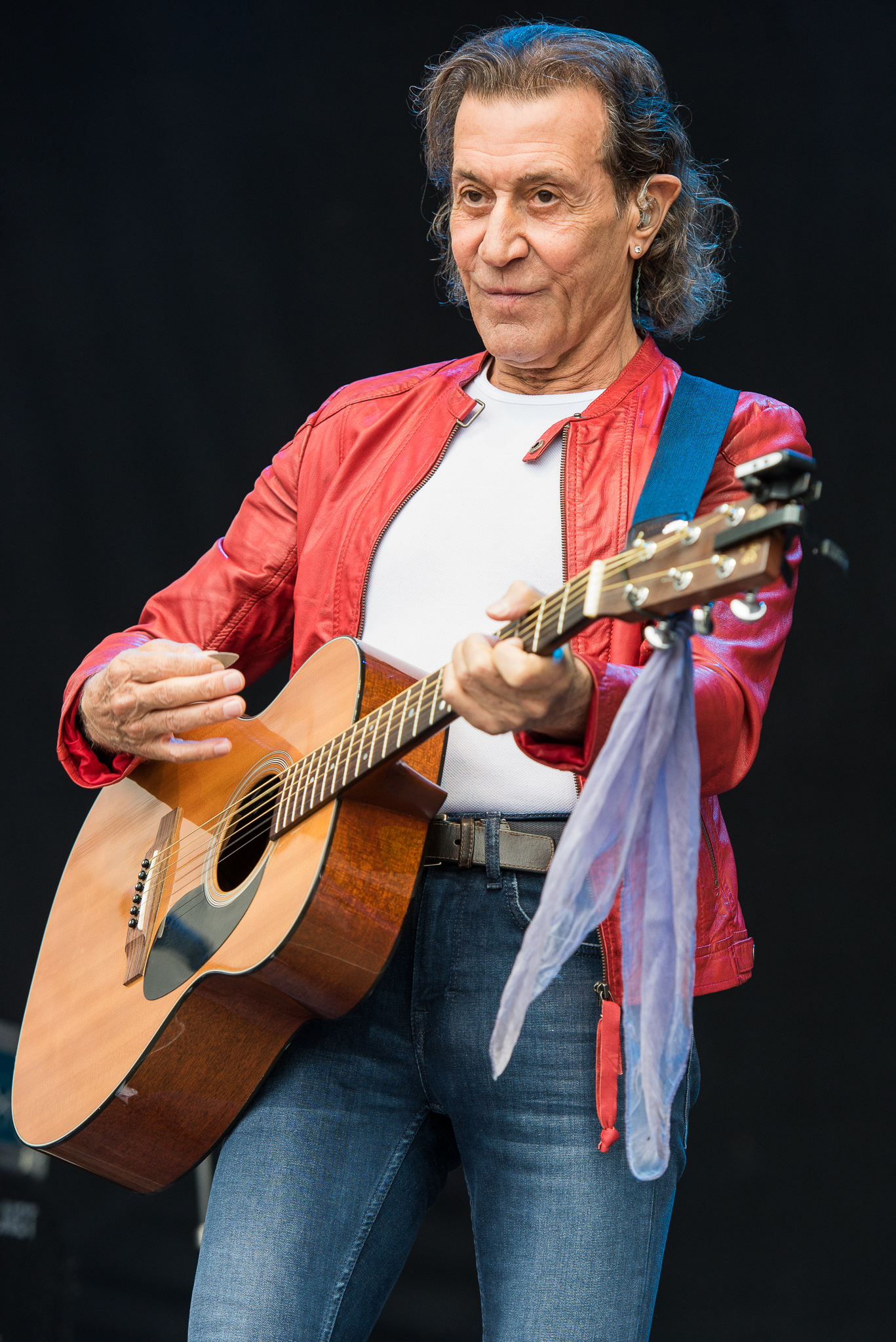 Albert Hammond,Concertbüro Franken,Festival,Konzert,Lieder am See,Livekonzert,Livemusik,Musik